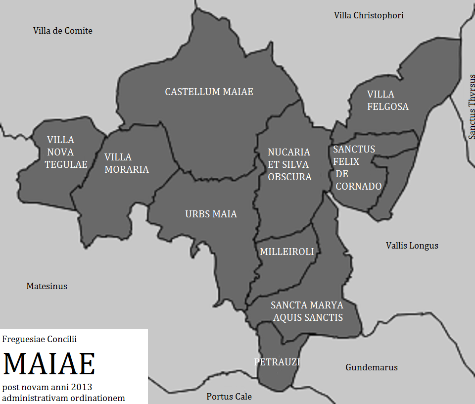 Concilii Maiae freguesiae post novam anni 2013 ordinationem administrativam.